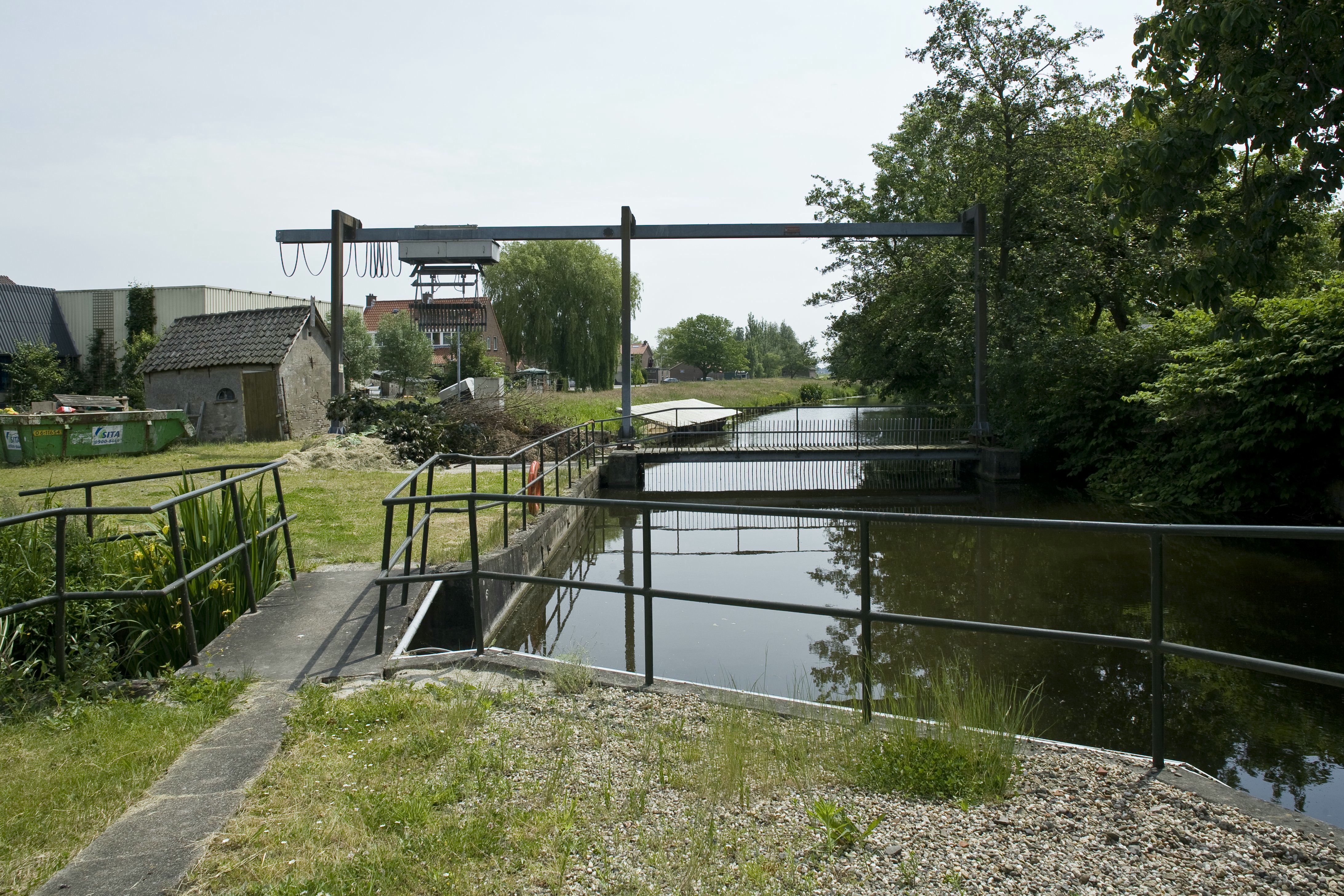 GEMAAL VERDOOLD: Zicht op de kroosbrug, gezien vanaf de achterzijde van het gemaal